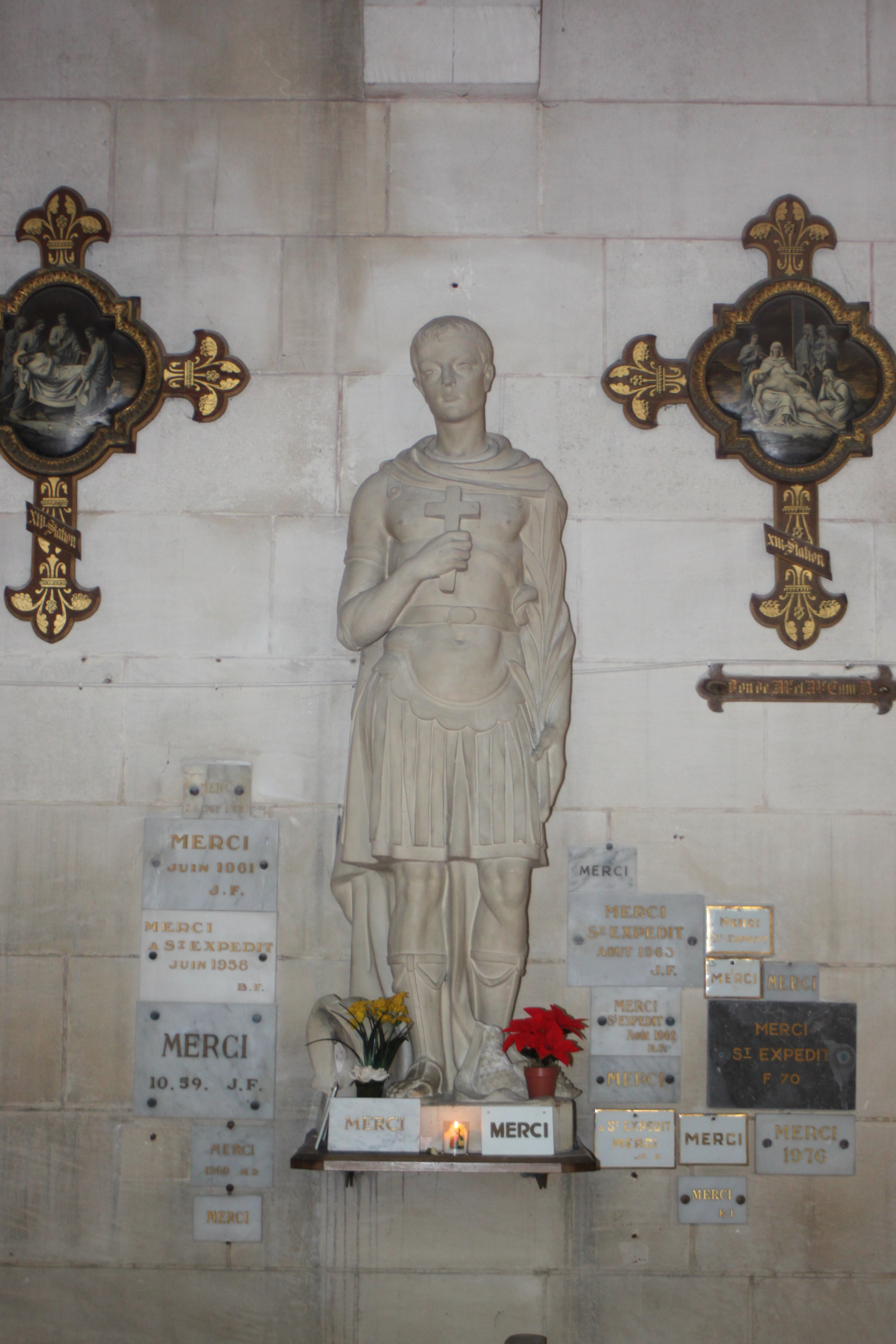 Saint-Expédit, église de Pontaillac, dite chapelle Notre-Dame des Anges, Fr-17-Royan.